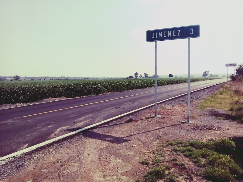 Entronque a la comunidad de Jiménez.